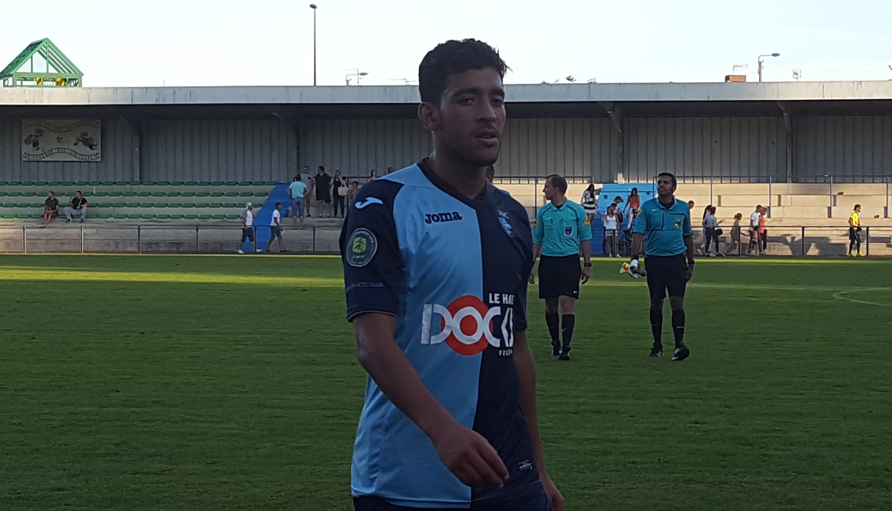 Tarik Tissoudali lors du match RC Lens B / Le Havre B, comptant pour la première journée du Championnat de France de football amateur (CFA) 2016-2017, le13 août 2016, au Stade François Blin d'Avion.